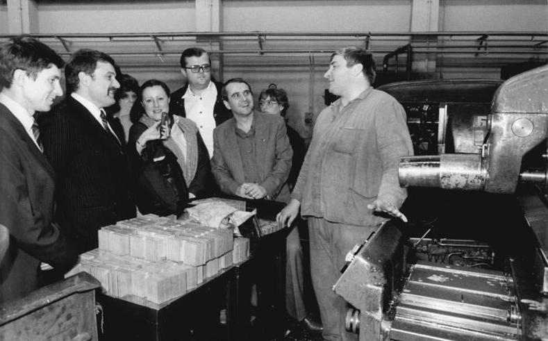 Berlin, Polnische Jugenddelegation im EAW ADN-ZB Zimmermann 2.2.84 Berlin: Polnische Jugenddelegation besuchte EAW Treptow- Der Vorsitzende des Hauptvorstandes des Sozialistischen Jugendverbandes Polens (ZSMP), Jerzy Jaskiernia (2.v.l.), informierte sich im Beisein des 1. Sekretärs des FDJ-Zentralrates, Eberhard Aurich (2.v.r.), im VEB-Elektro-Apparate-Werke Berlin- Treptow "Friedrich Ebert" über die Arbeit der FDJ. Dabei kam es auch zu einem Gespräch mit dem Fräser Josef Mostowski (r.) aus Polen.